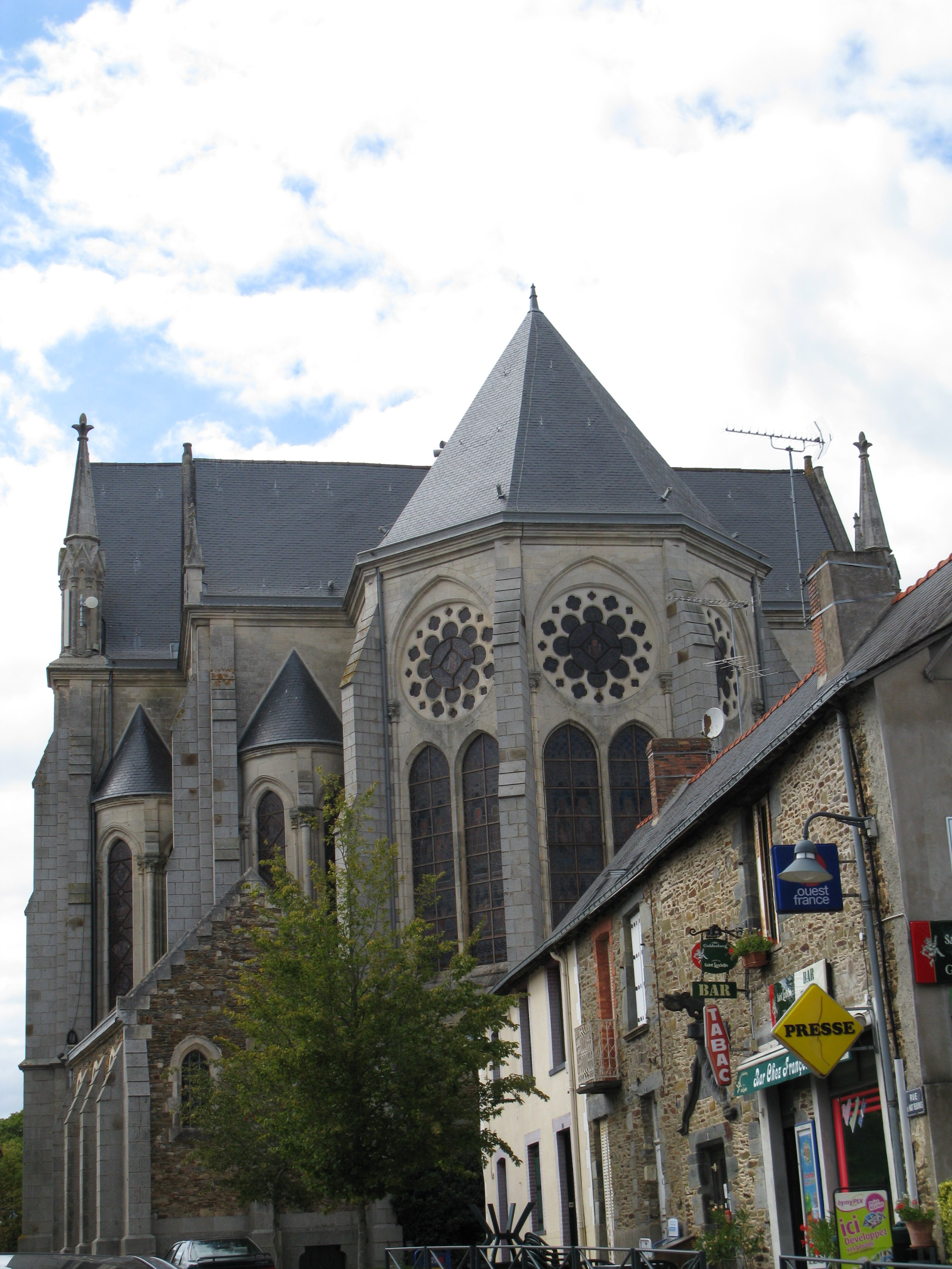 Église de Rougé